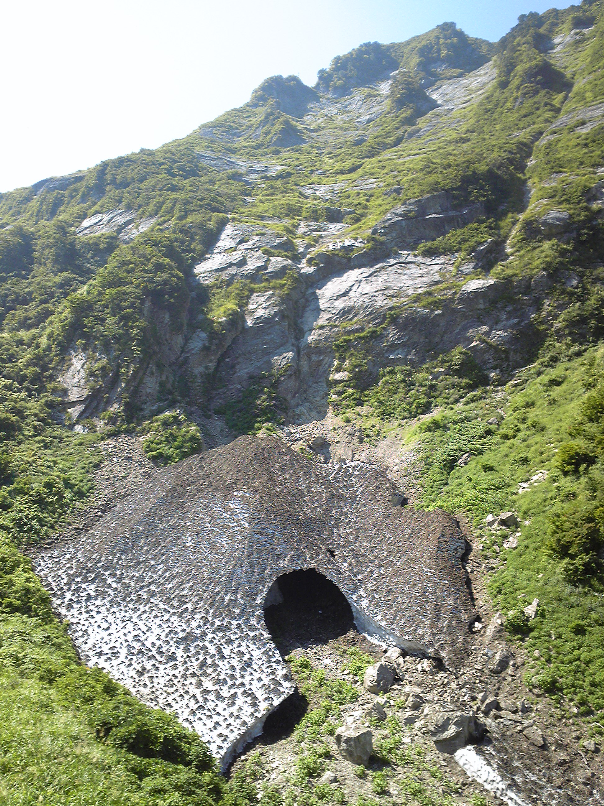 新潟県 権現岳の東斜面。万年雪と頂上部分。